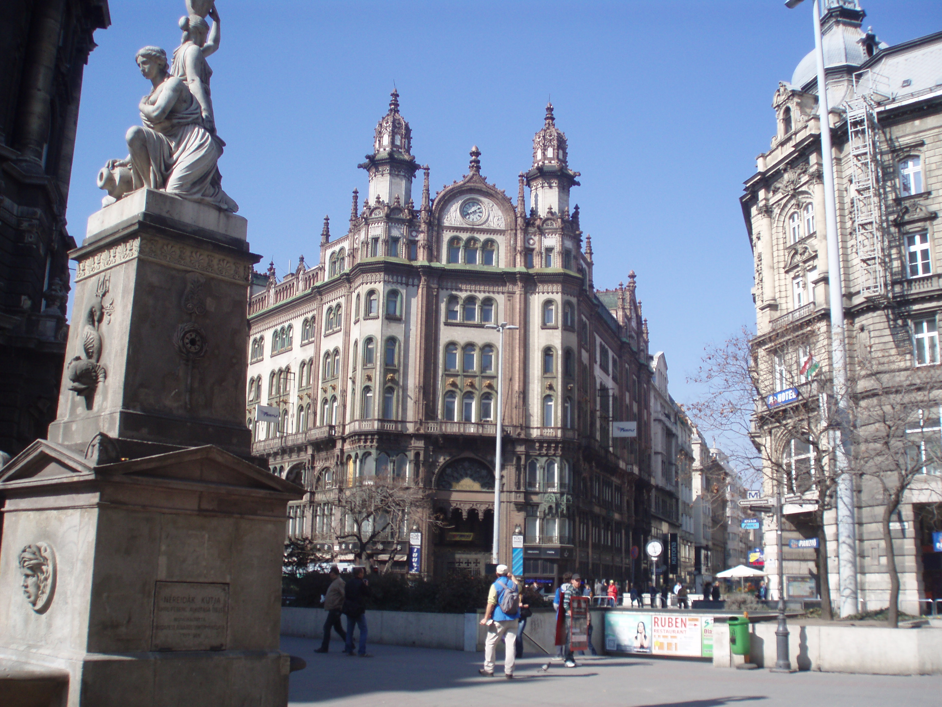 Arquitectura de Budapest, magníficos edificios. Budapest, Petőfi Sándor u. 2